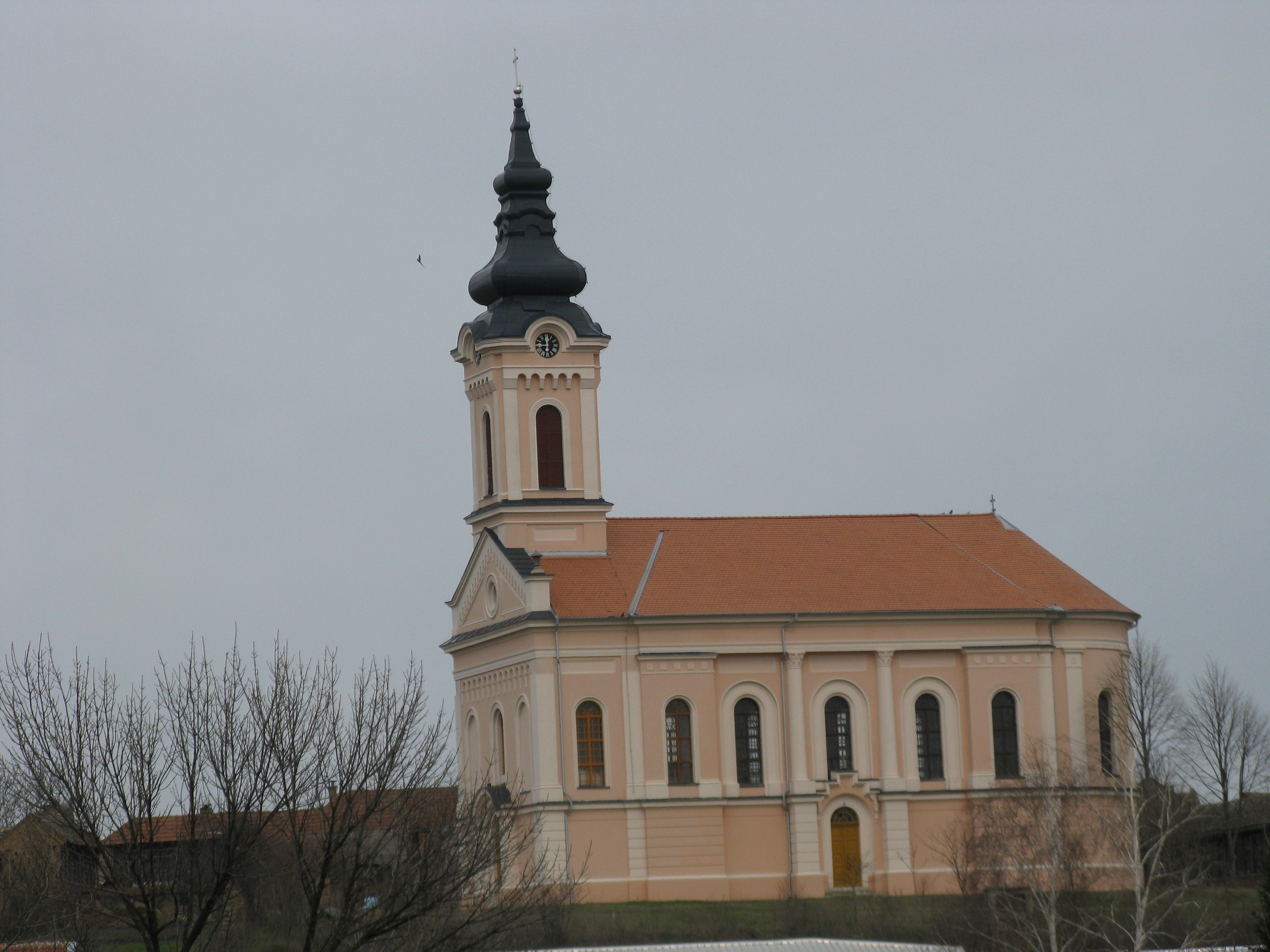 Црква је мањих димензија, саграђена је 1888. године на узвишици изнад центра села, збиг чега је добила назив Мала горња. Сазидана је као неокласицистичка грађевина,на месту старе цркве која је срушена. Иконостас је 1901. године осликао Паја Јовановић. То је једна од ретких религиозних сцена у опусу овог нашег познатог сликара.